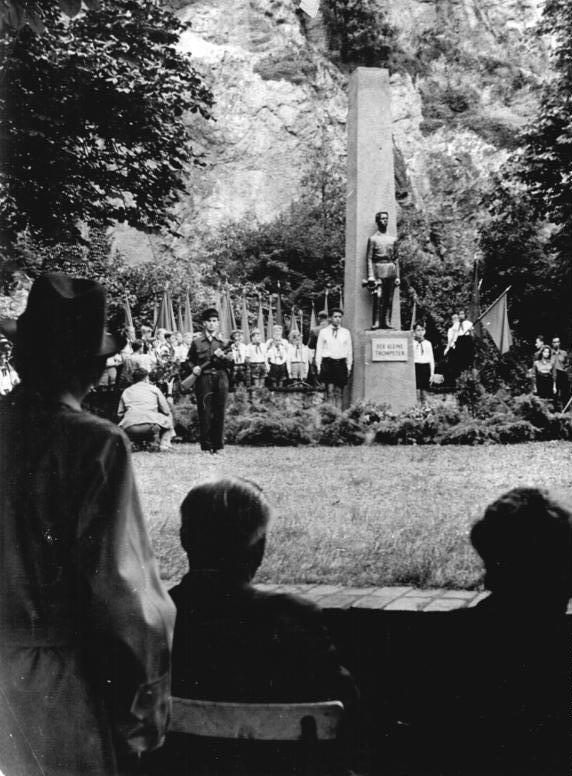 Halle, Rive-Ufer, Fritz-Weineck-Denkmal Zentralbild Sonderred. Halle 14.8.1958 III. Pioniertreffen in Halle Zum Gedenken an den von der Reaktion erschossenen Arbeiterjungen Fritz Weineck, des "kleinen Trompeters" wurde am 14.8.1958 aus Anlass des III. Pioniertreffens am bisherigen Rive-Ufer in Halle, das gleichzeitig in "Fritz-Weineck-Ufer" umbenannt wurde, eine Statue aufgestellt. UBz: Blick auf das Denkmal nach der feierlichen Enthüllung.